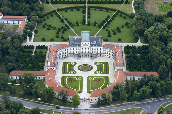 A fertődi Esterházy-kastély a levegőből